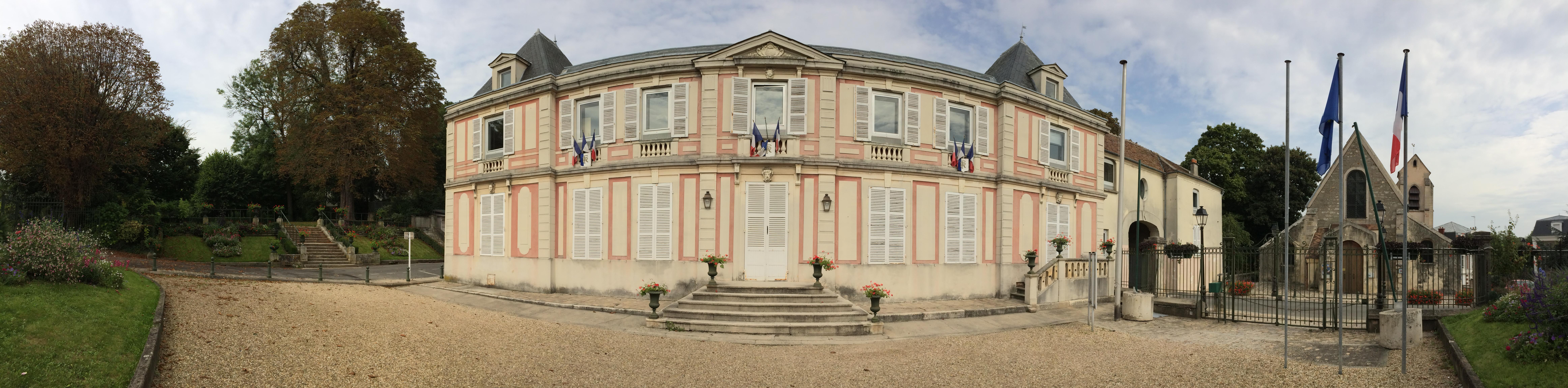 Photo panoramique de la façade de la Mairie de Villeneuve-le-Roi. A gauche : accès au parc de la Mairie. A droite : Eglise Saint-Pierre - Saint-Paul.